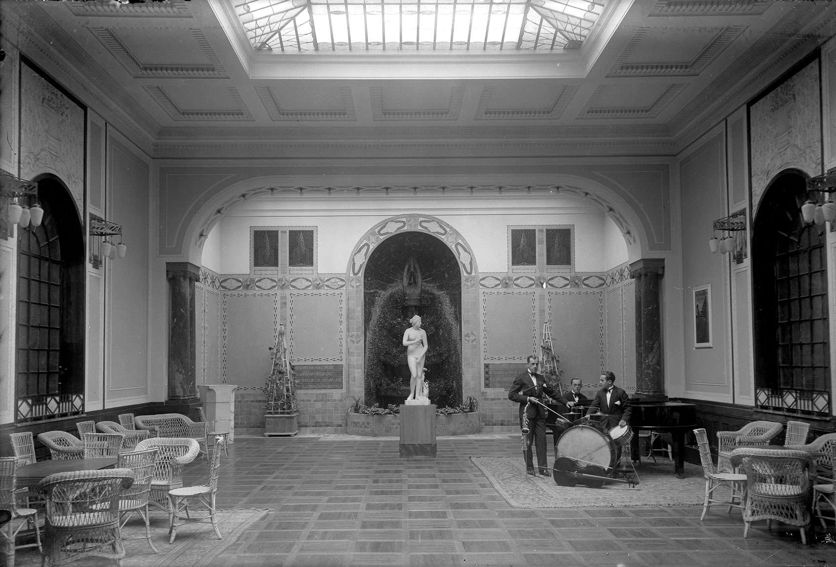 Großer Saal im König-Karls-Bad in Wildbad im Schwarzwald